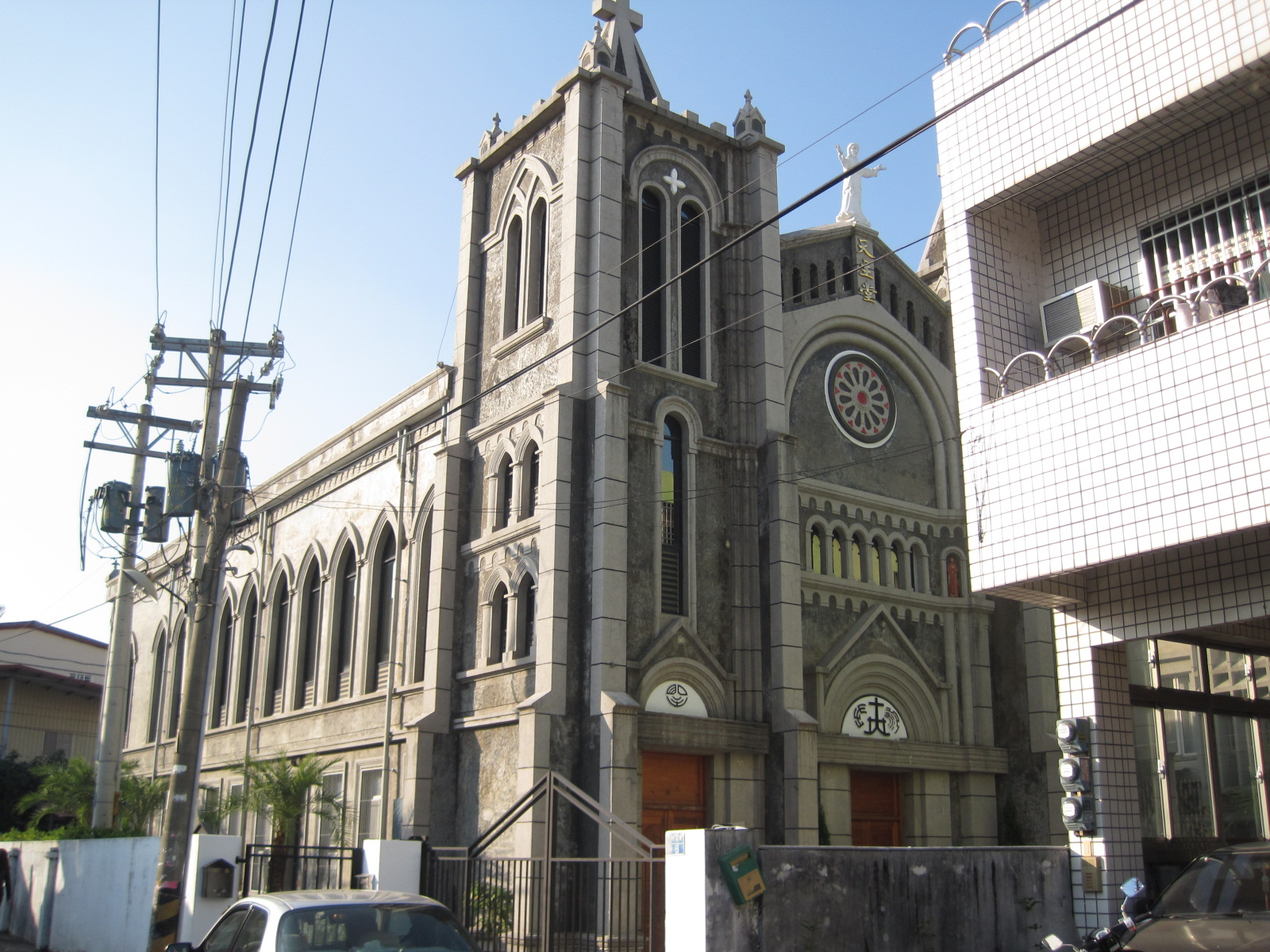 旗山聖若瑟天主堂